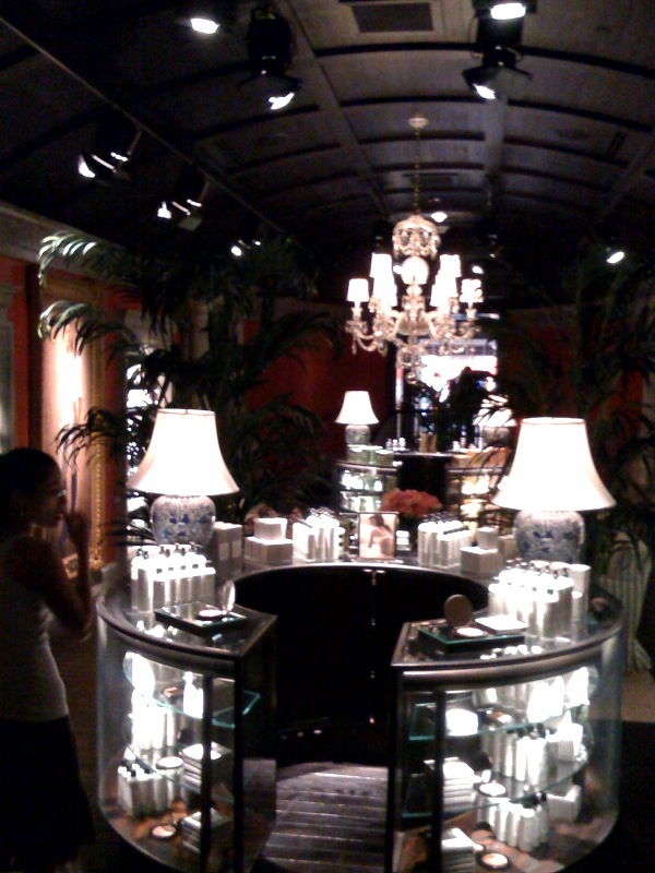 Interior de la Tienda Gilly Hicks en Aventura Mall